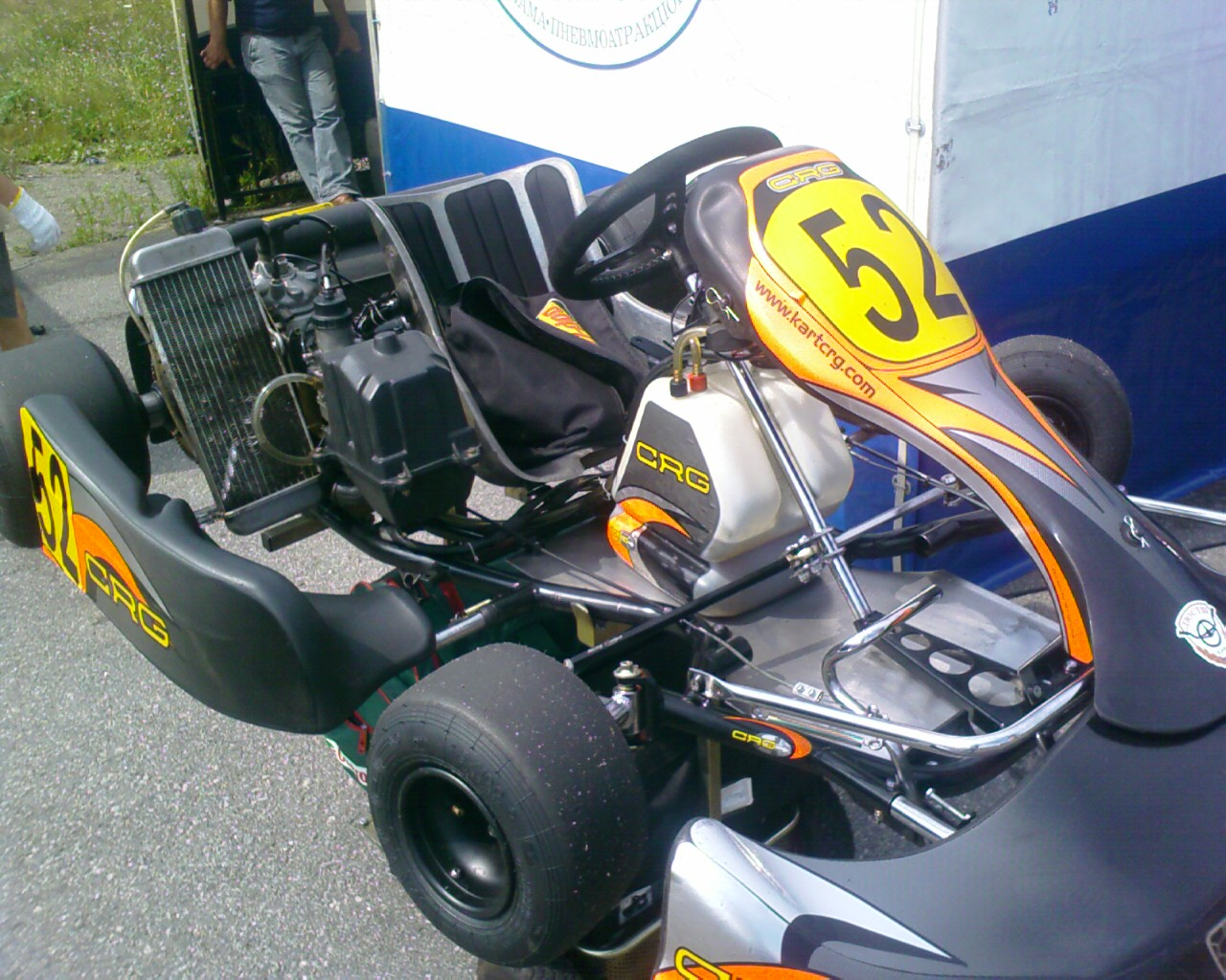 Спортивный карт класса Rotax-Max